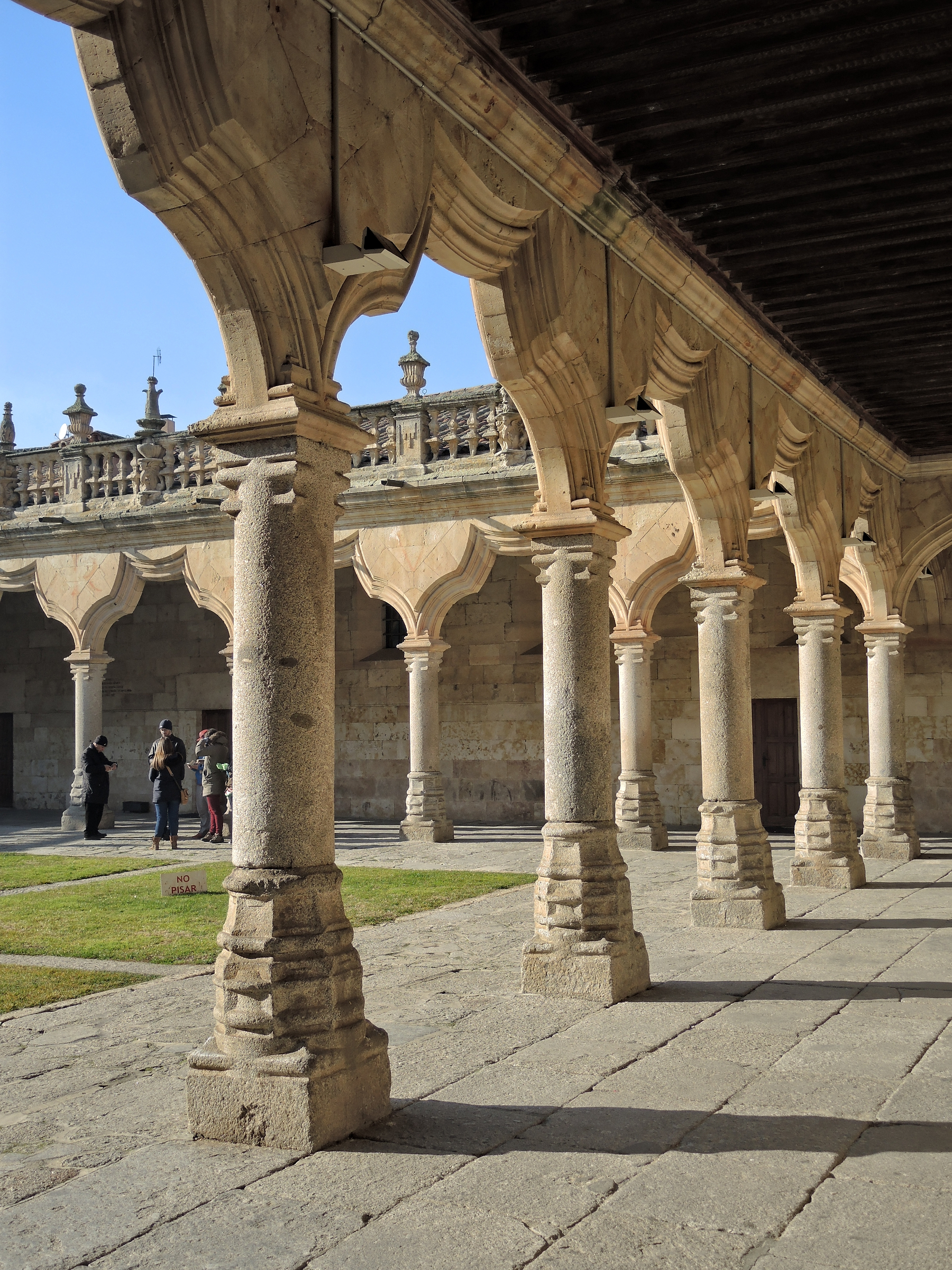 Patio en la Universidad de Salamanca, España, 30 de diciembre 2016. Arquitectura, patrimonio, Heritage